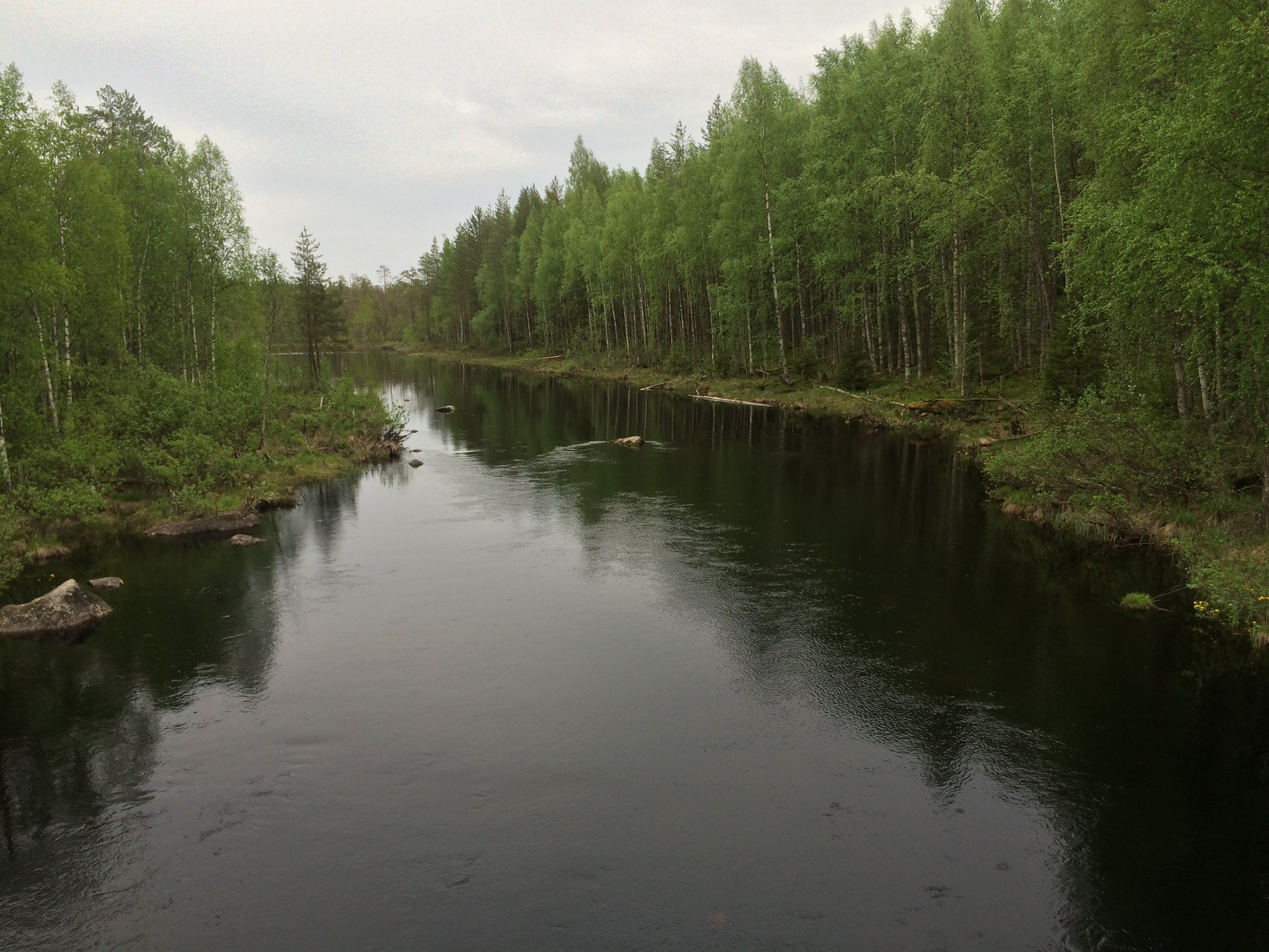 Лузингилакши